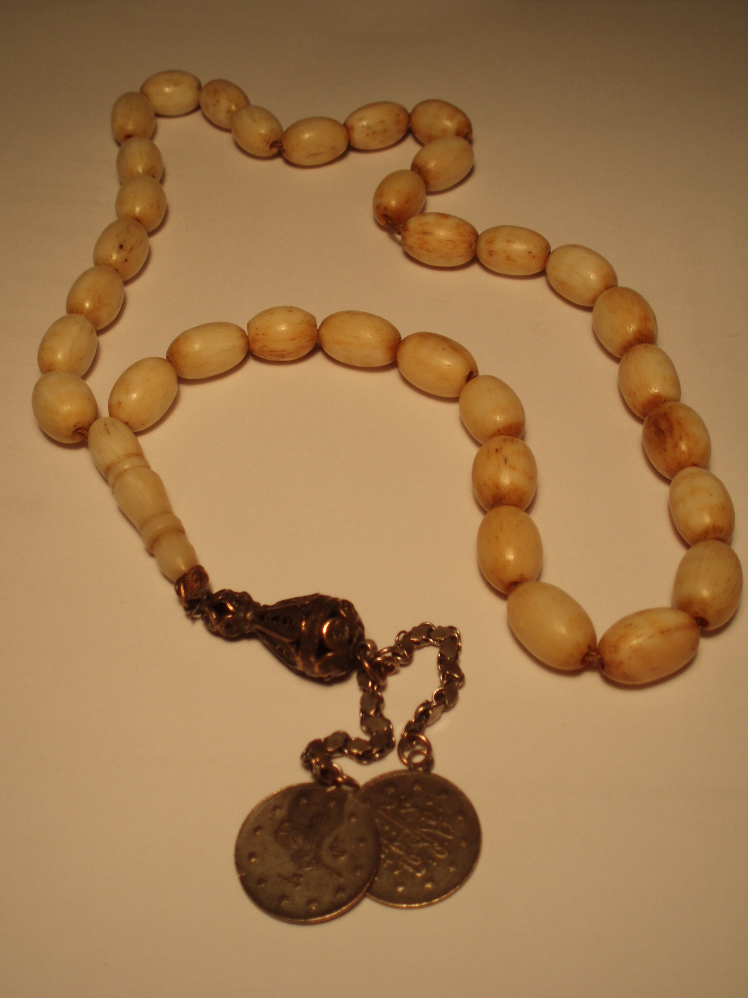 Tasbih, dated 1909 (1327 AH)